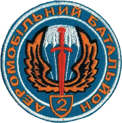 Парадний нарукавний шеврон 2-го батальйону 95-ї окремої аеромобільної бригади